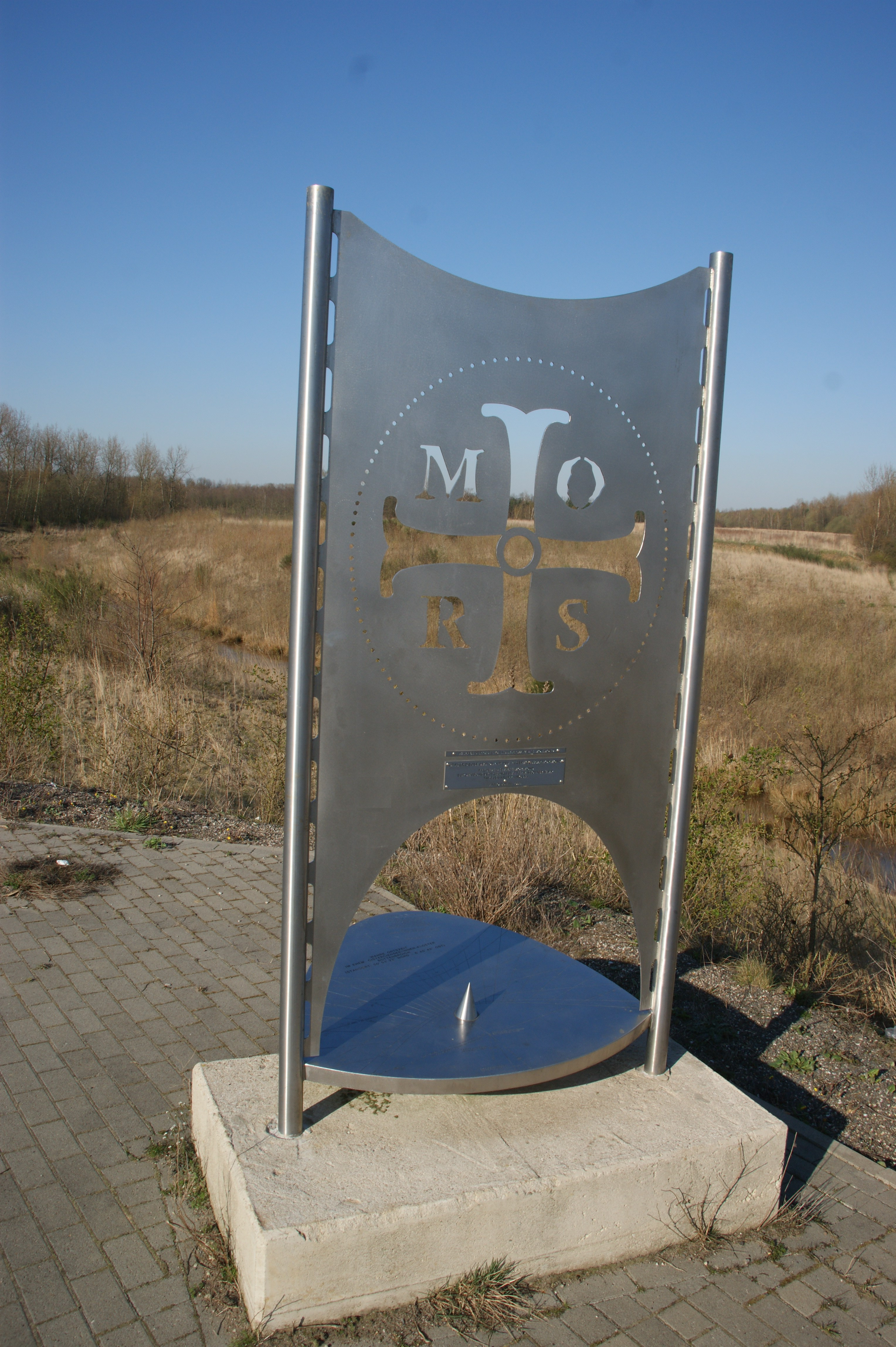 Sonnenuhr auf dem Marienfeld, etwa am Platz des Klosters Bottenbroich